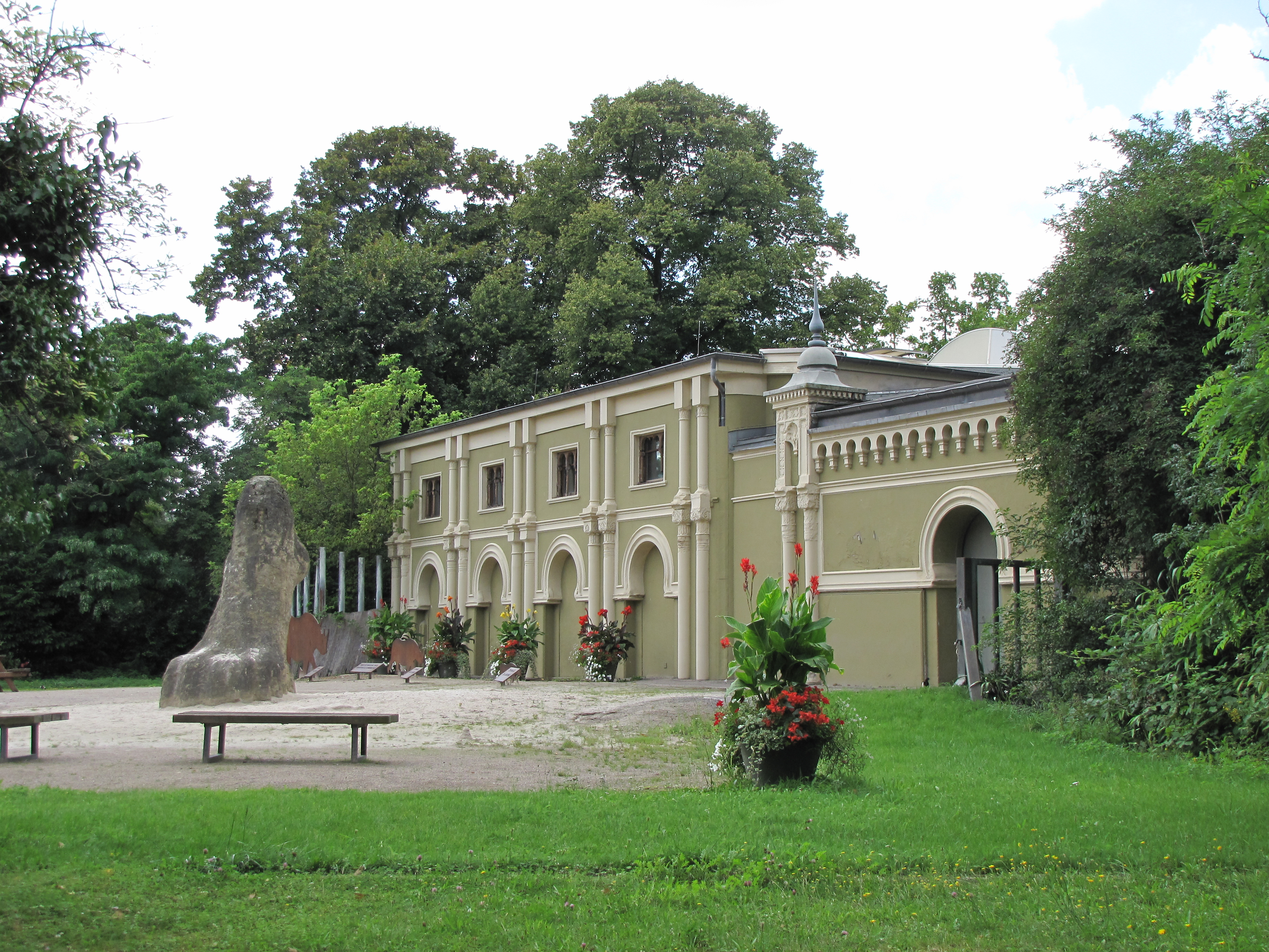 Kölner Zoo: Giraffen- und Antilopenhaus mit Anbau für Elefanten. Architekt: Josef Felten. Erbaut 1863/64, erweitert 1874. Maurische Architektur; beim Erweiterungsbau Anklänge an die indische Architektur